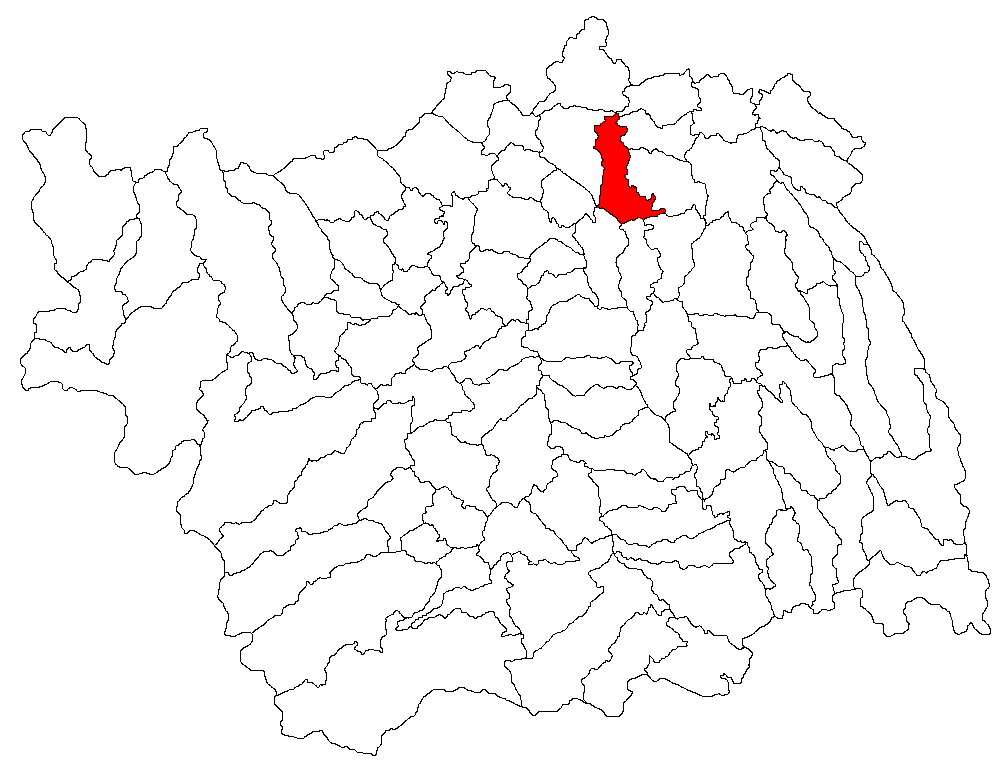 Categorie:Hărţi ale judeţului Bacău